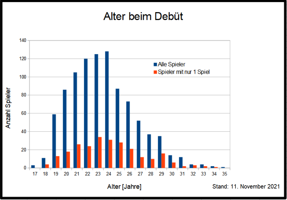 Altersverteilung der deutschen Fußballnationalspieler beim Debut, Stand 11.8.2010